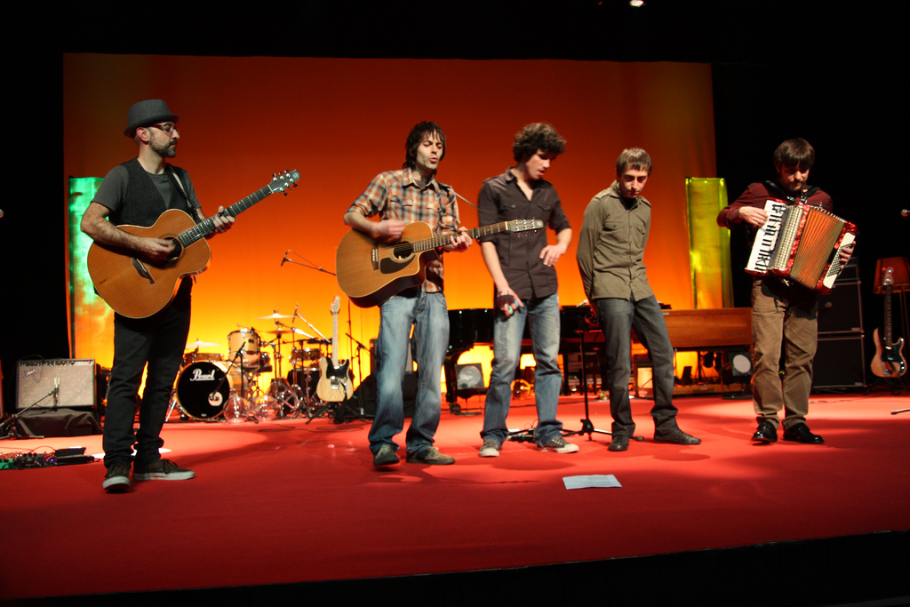 Bide Ertzean Leidorren